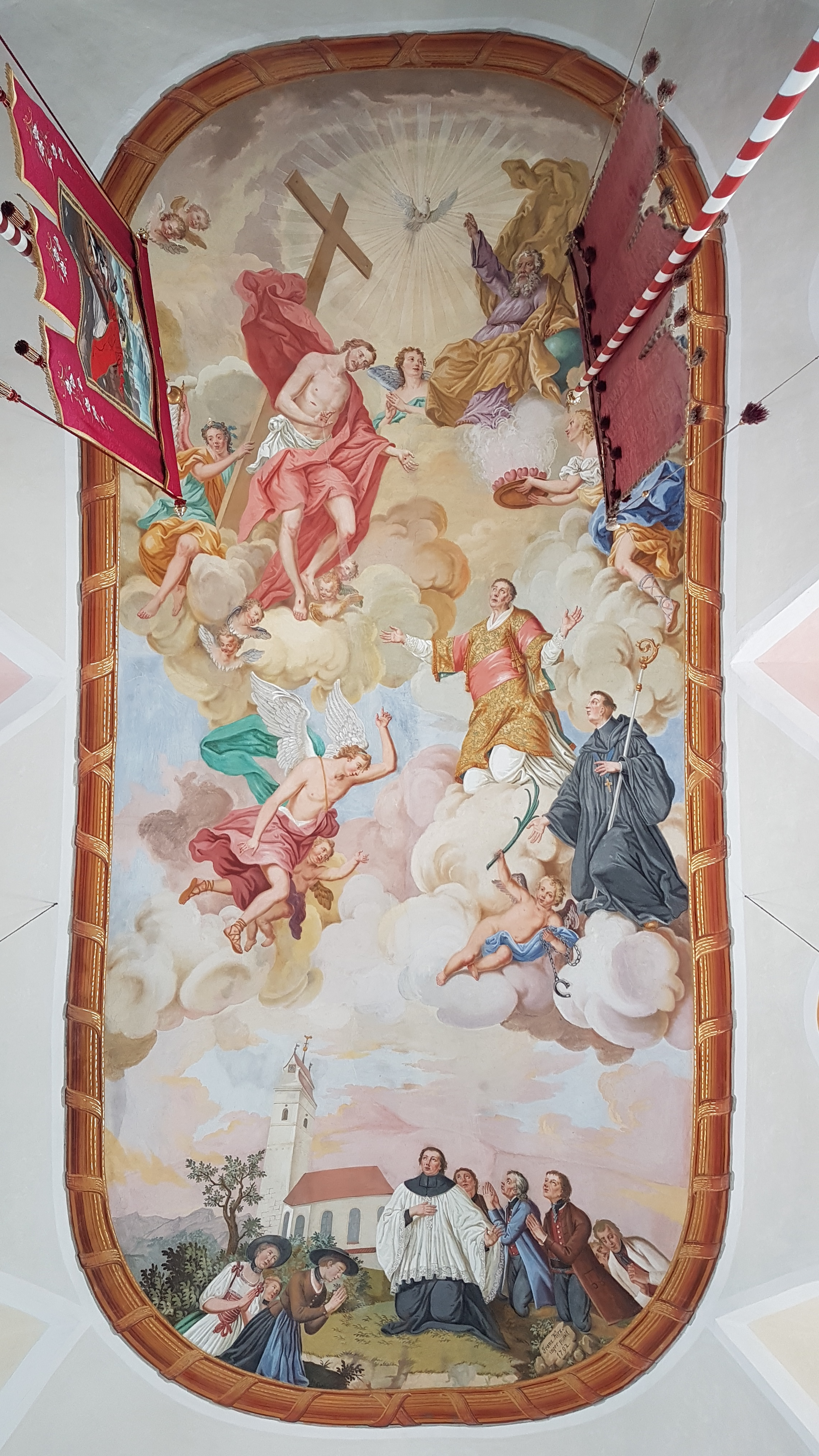 Riegsee, St. Stephan